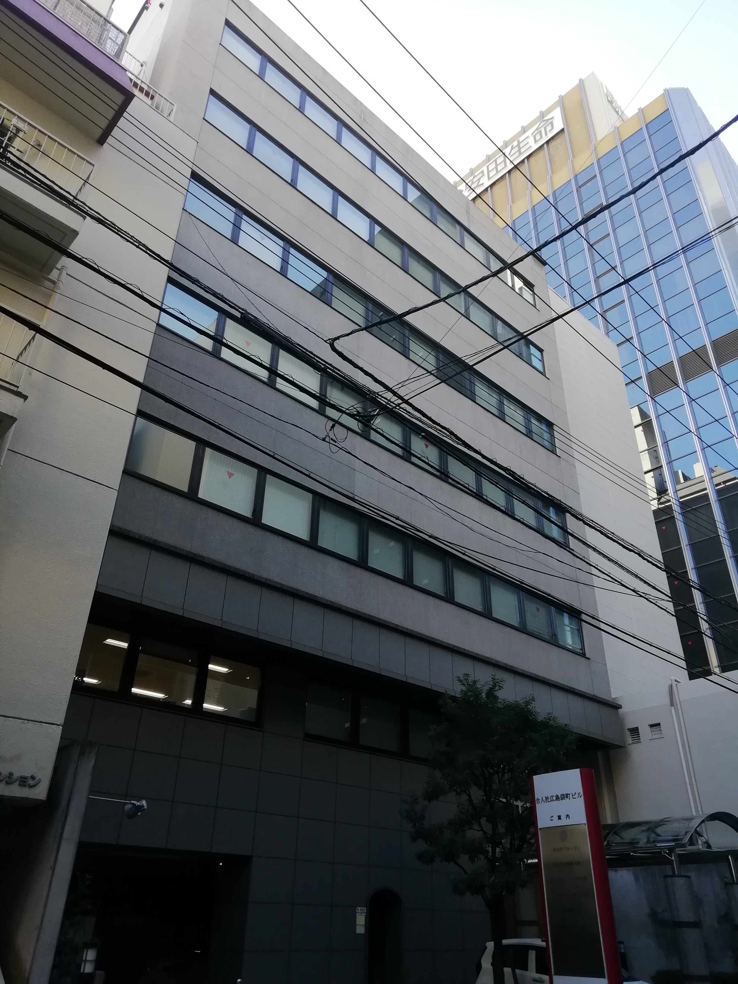 合人社グループ